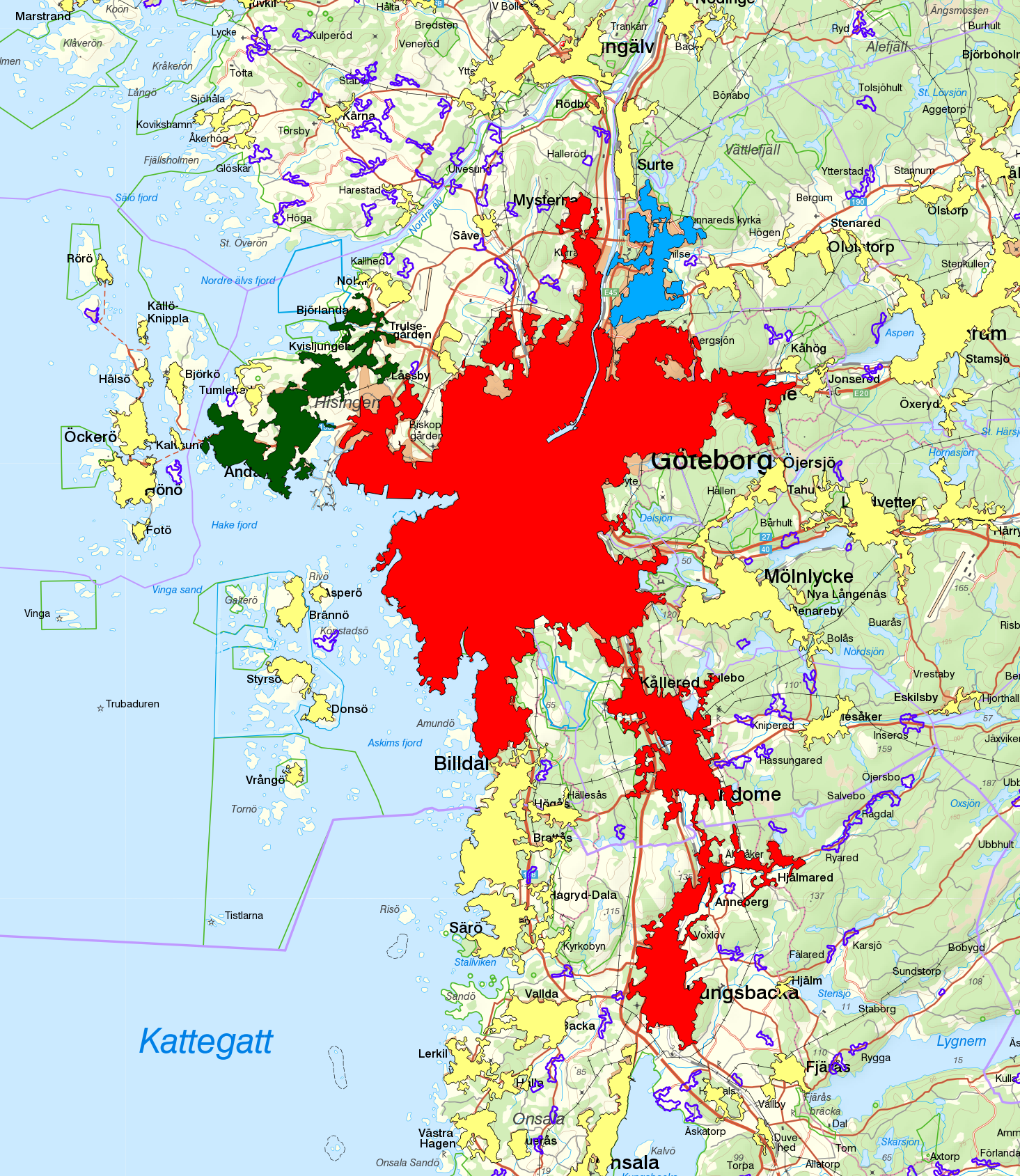 Tätorterna Göteborg, Björlanda och Torslanda samt Gunnared och Hammarkullen med gränserna från Statistiska centralbyråns tätortsavgränsning 2015 och gränserna från småortsavgränsningen 2015 i lila. Göteborg i rött, Björlanda och Torslanda i grönt samt Gunnared och Hammarkullen i blått. Bakgrundskarta från Lantmäteriet, skala 1:120 944.